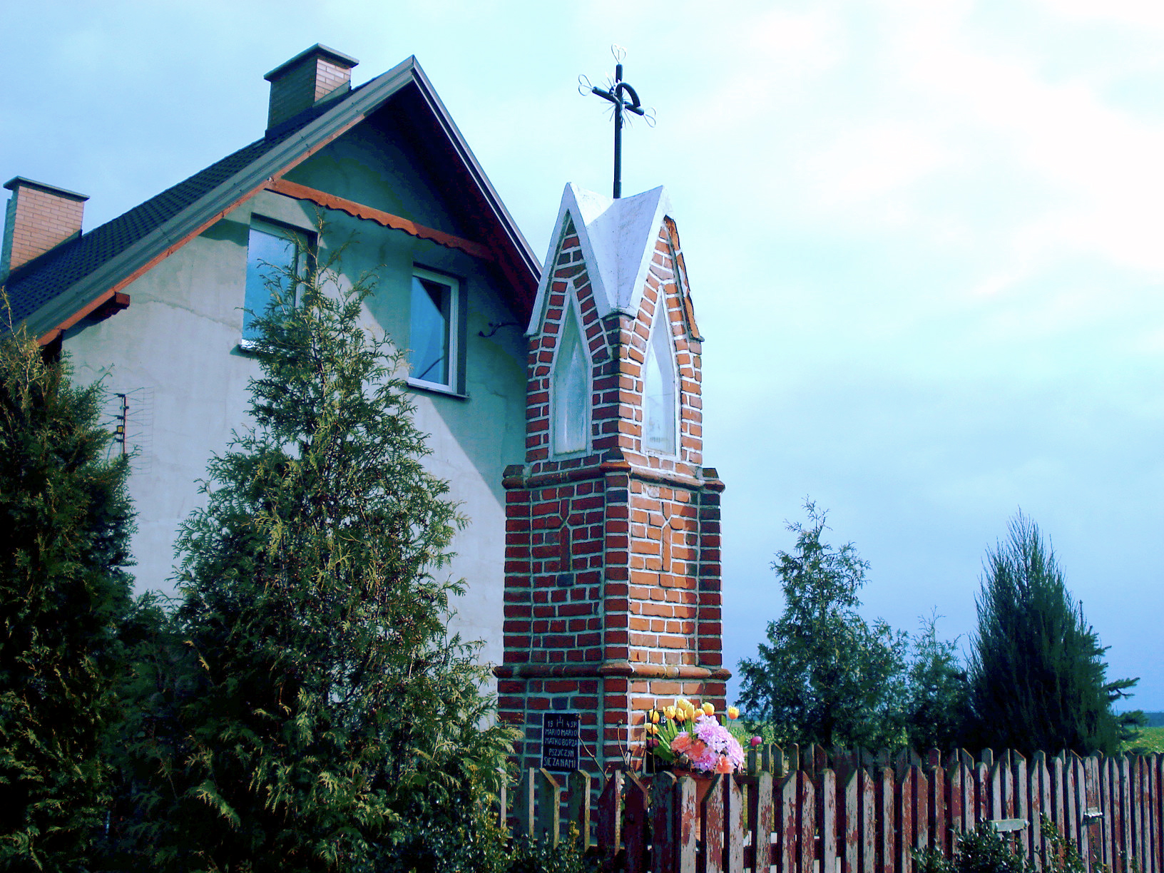 kapliczka. kapliczka (zbudowana w 1945r.).